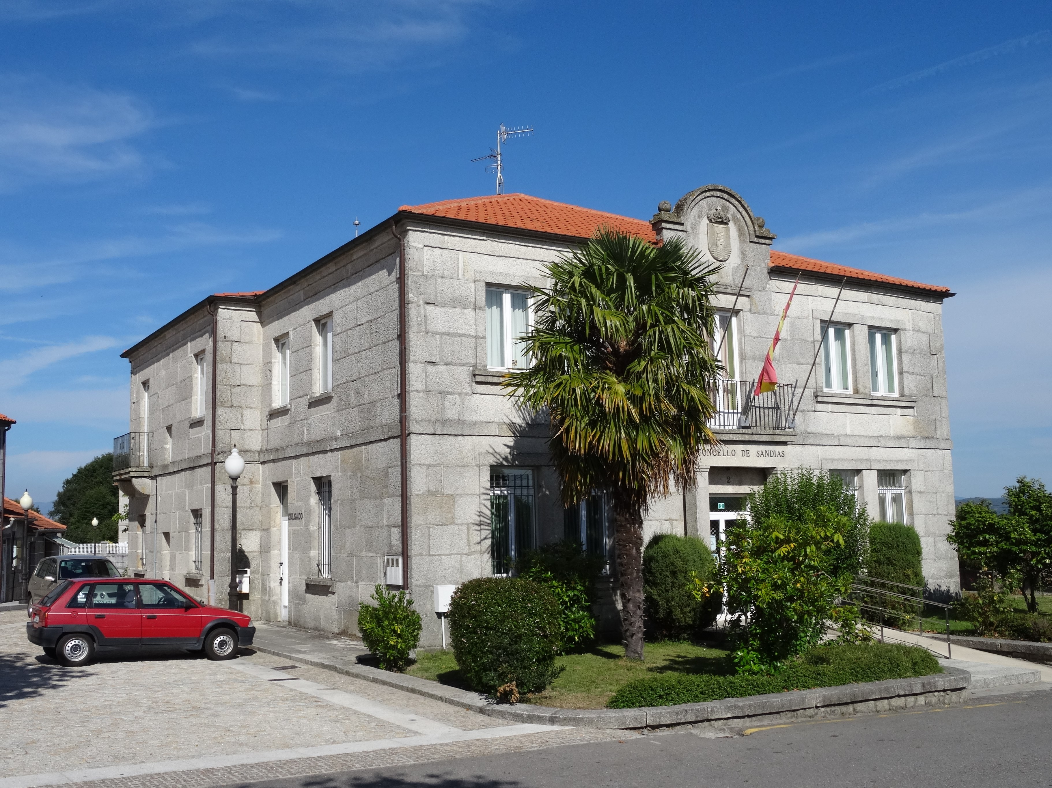 Casa do concello de Sandiás, Ourense.